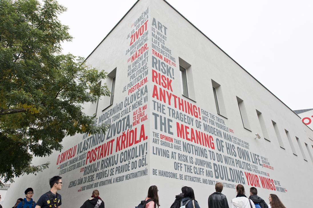 foto